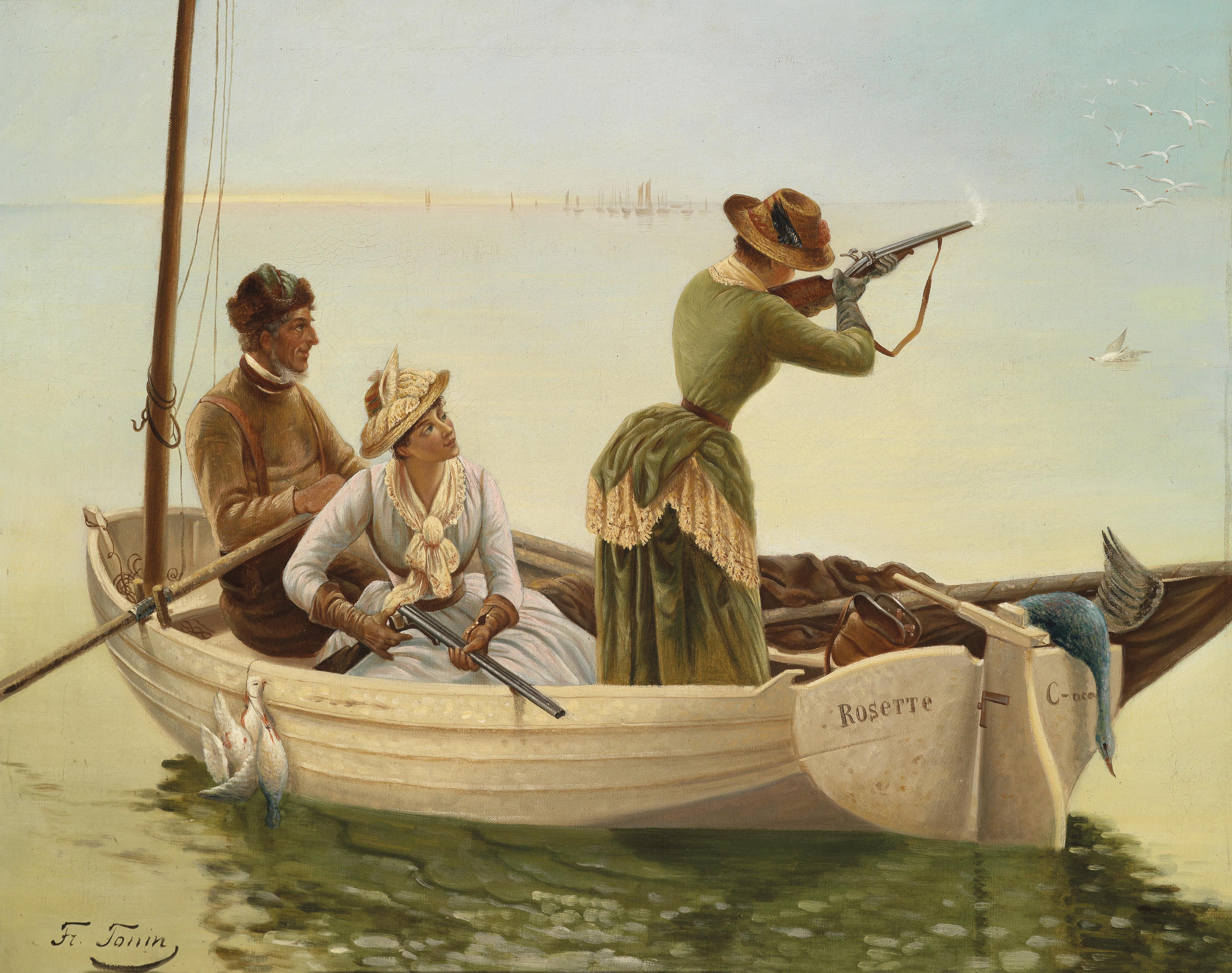 Möwenjagd, signiert „Fr. Tonin“,Öl auf Leinwand, 63,5 x 80 cm